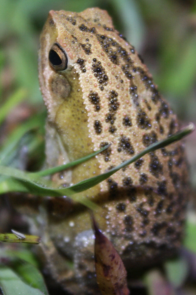 Taken in Wu Kau Tang area.